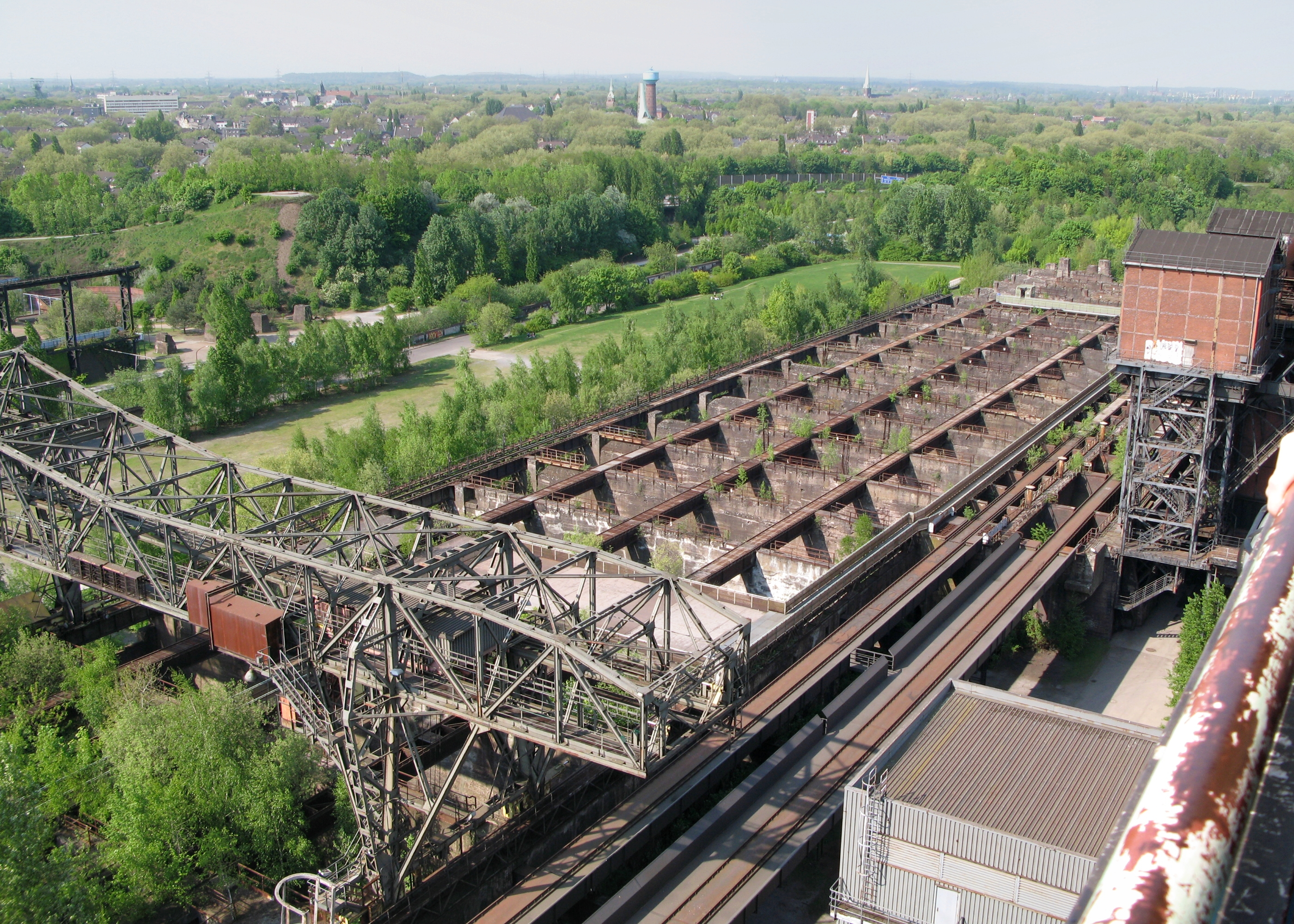 Landschaftspark Duisburg-Nord - Blick auf die Bunkeranlagen